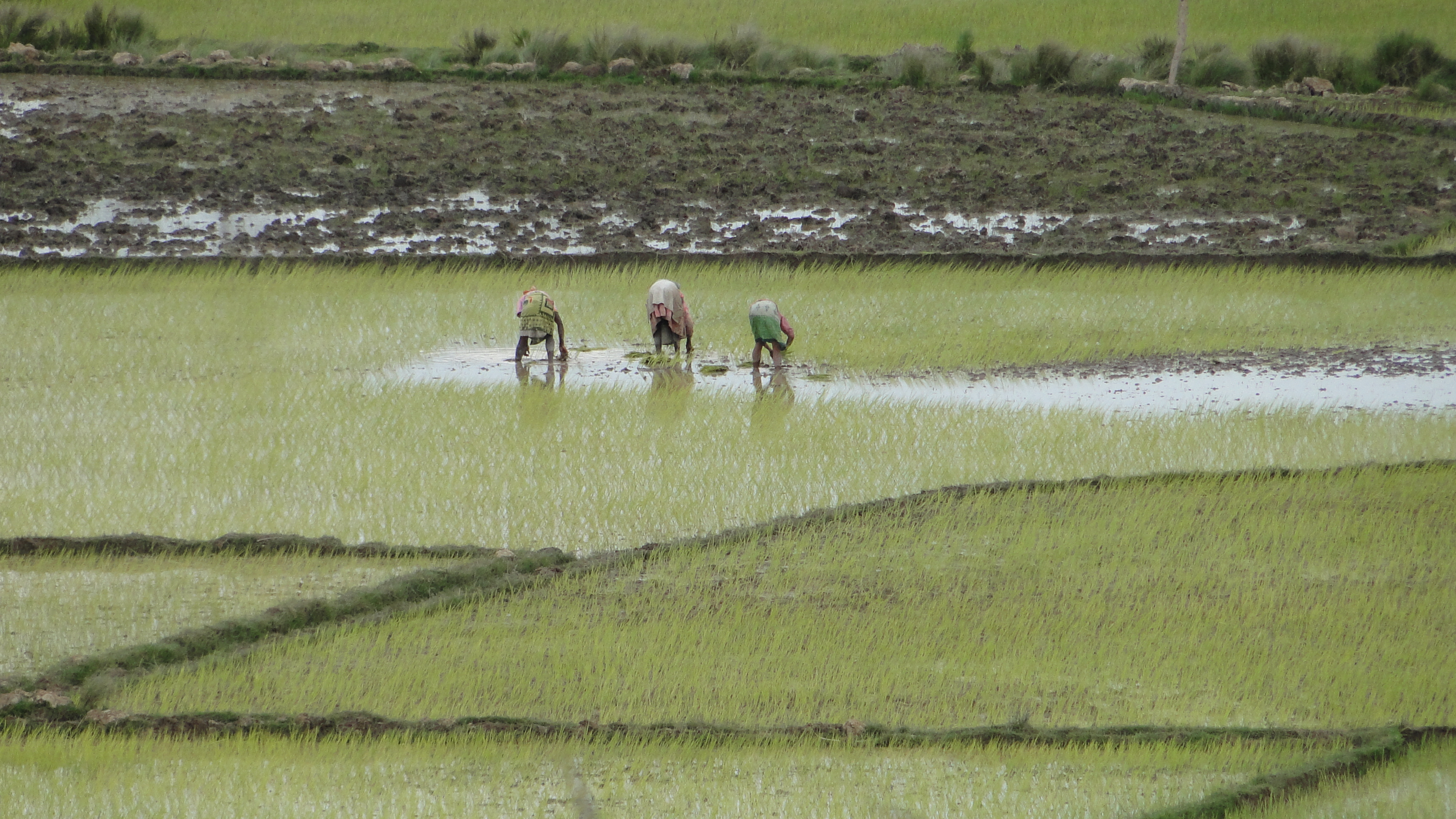 Piquage des pied de riz à AMBALANDINGANA This is an image of food from Madagascar